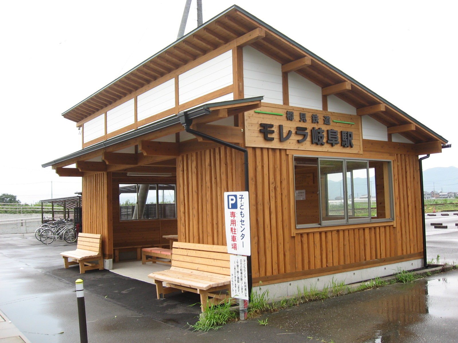 モレラ岐阜駅駅舎